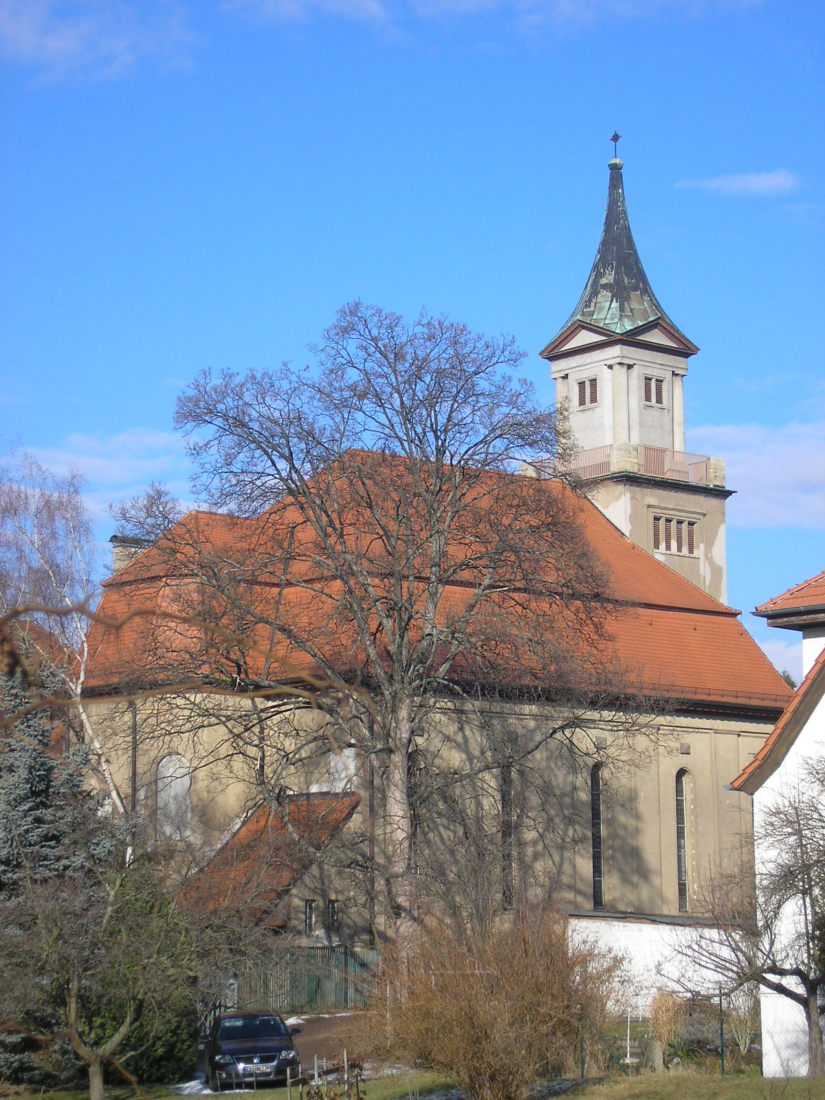 Die Christuskirche in der Tettaustraße in Erfurt (Thüringen).